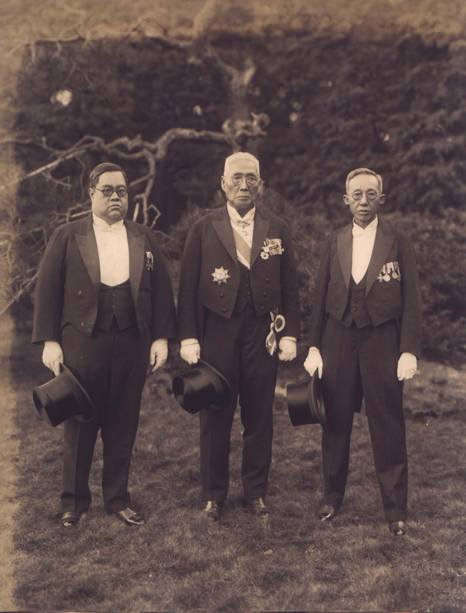 林熊徵 (左) 辜顯榮 (中) 藍高川 (右) infomation about the photo (p.12)